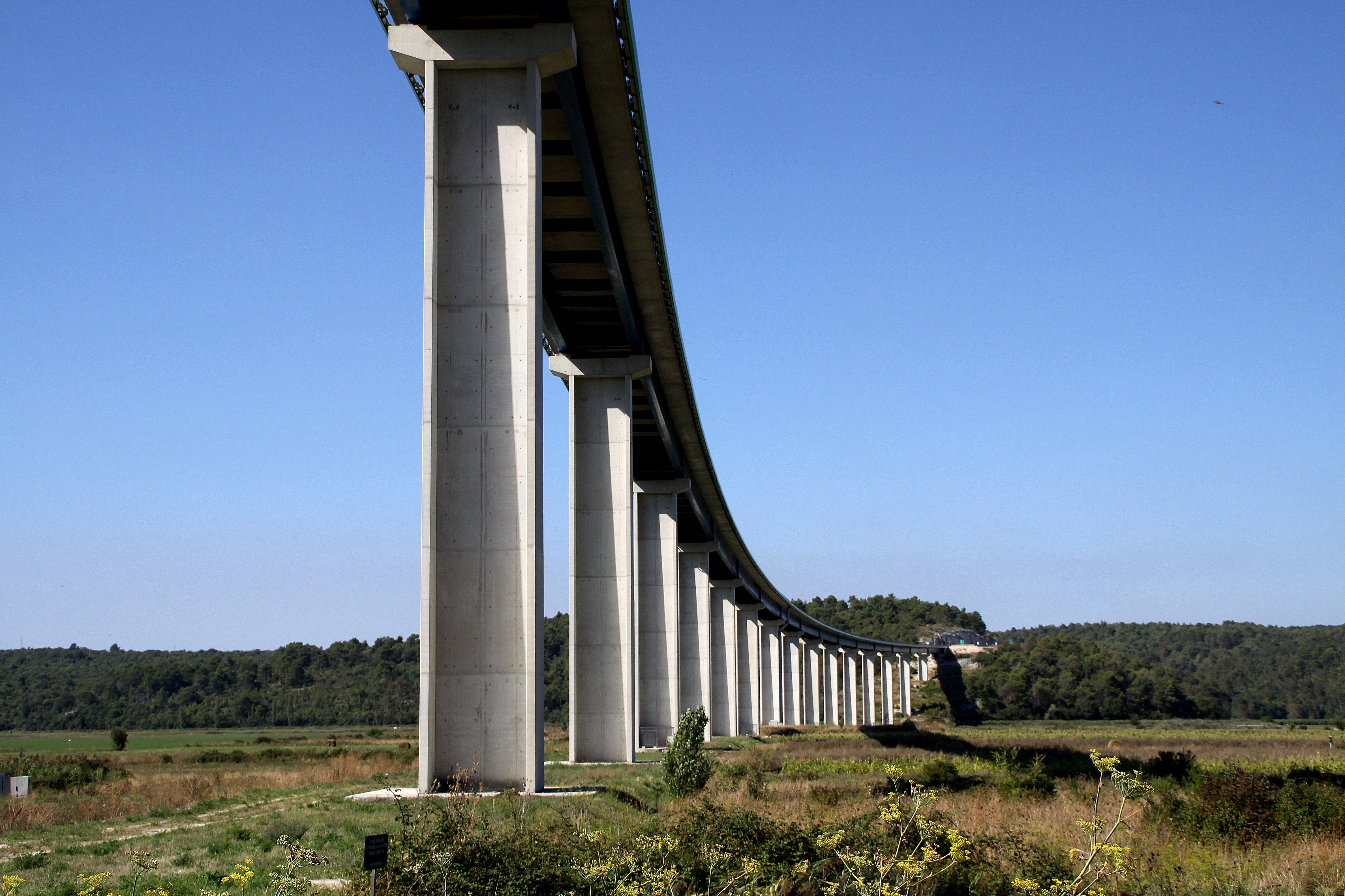 Autobunnsbréck iwwer den Dall vun der Mirna